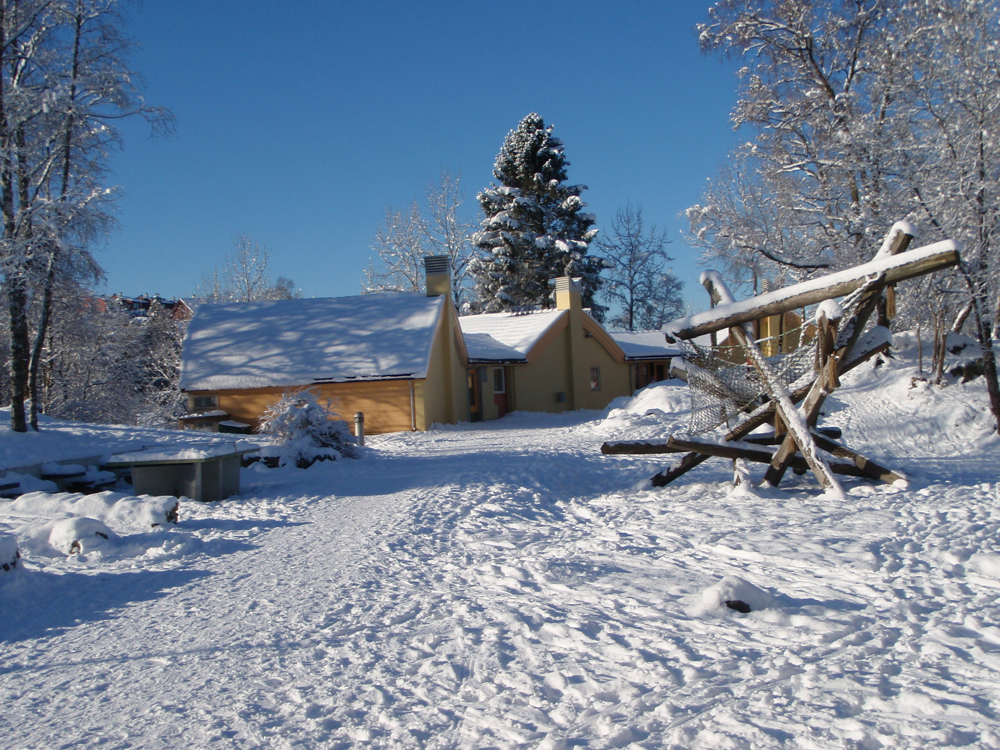 Klasserommene til 2. - 4. klasse.